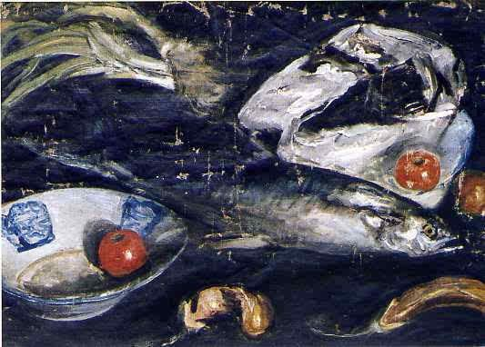 李鐵夫的油畫《魚與茄》